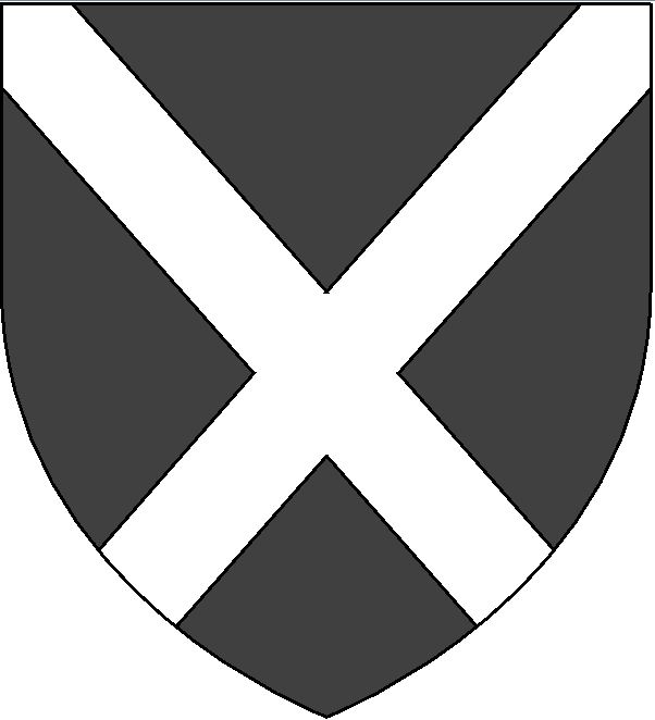 Blason Angennes